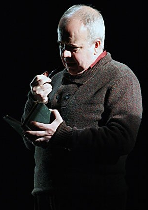 Marco Balbi, in Sinfonia d'autunno